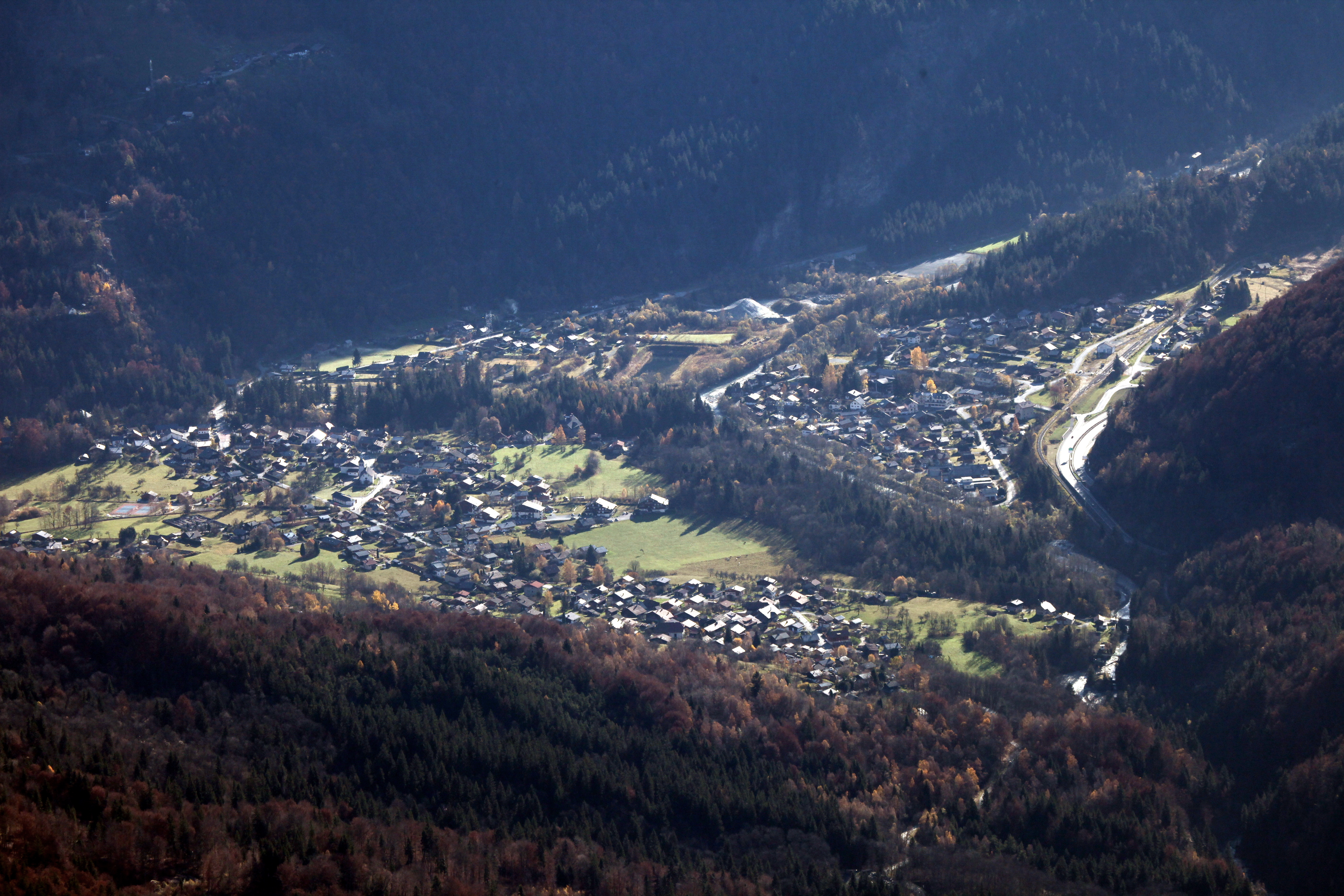 Vue de Servoz depuis Platé.